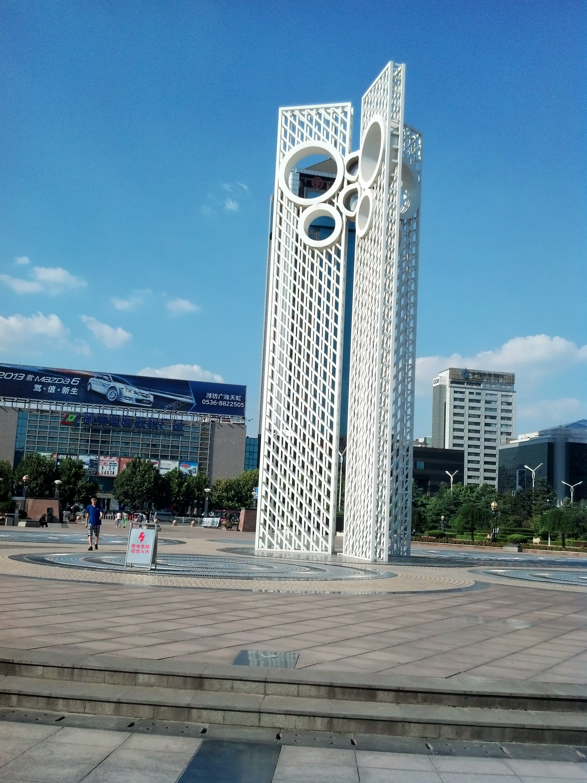 Weicheng, Weifang, Shandong, China